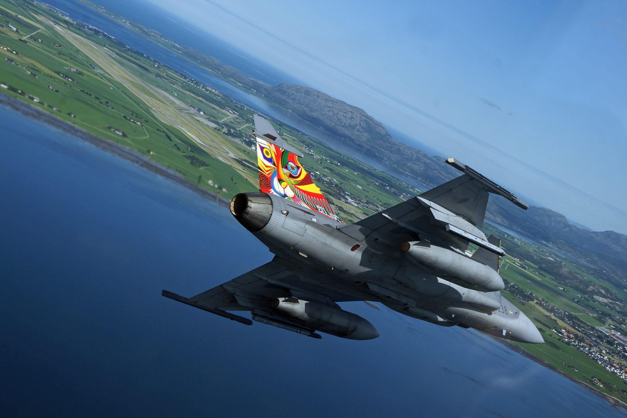 Saab JAS-39 Gripen (Czech Air Force)